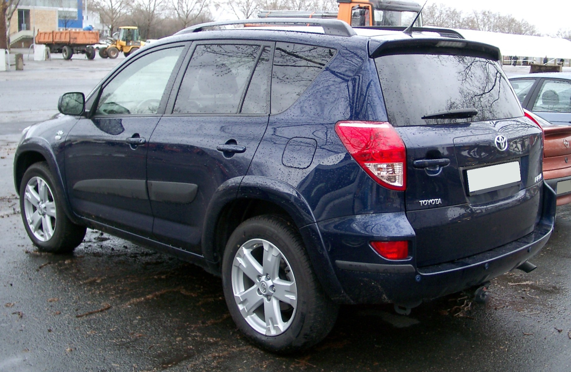 Toyota RAV4, 3. Generation